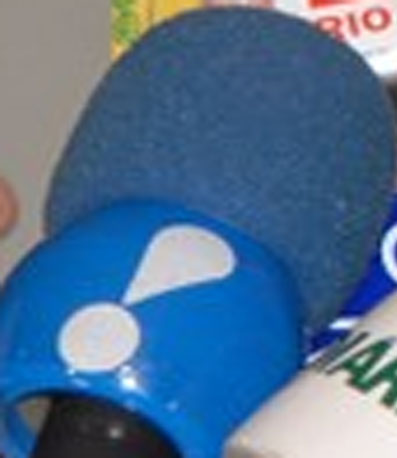 Detalhe de um microfone da emissora brasileira RedeTV!